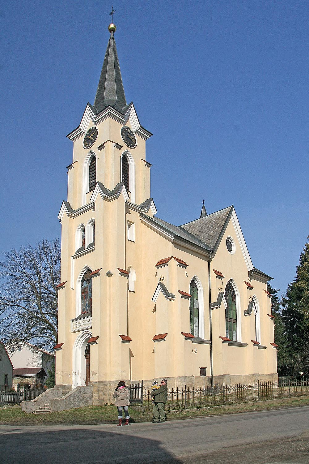 Kaple na křižovatce v obci Žďár, district Mladá Boleslav autor:Prazak date:11. 3. 2007